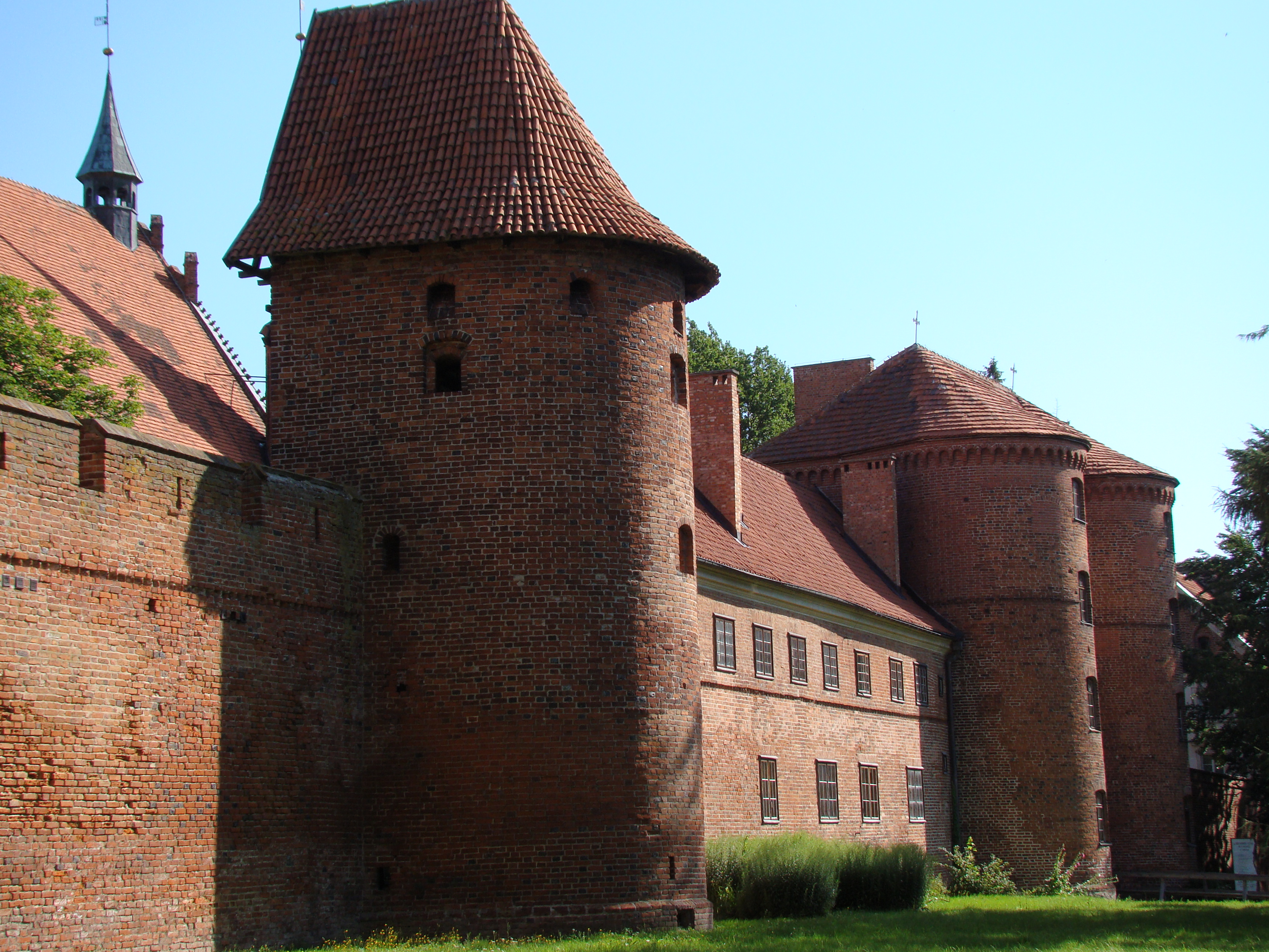 baszta południowa w zespole Wzgórza Katedralnego